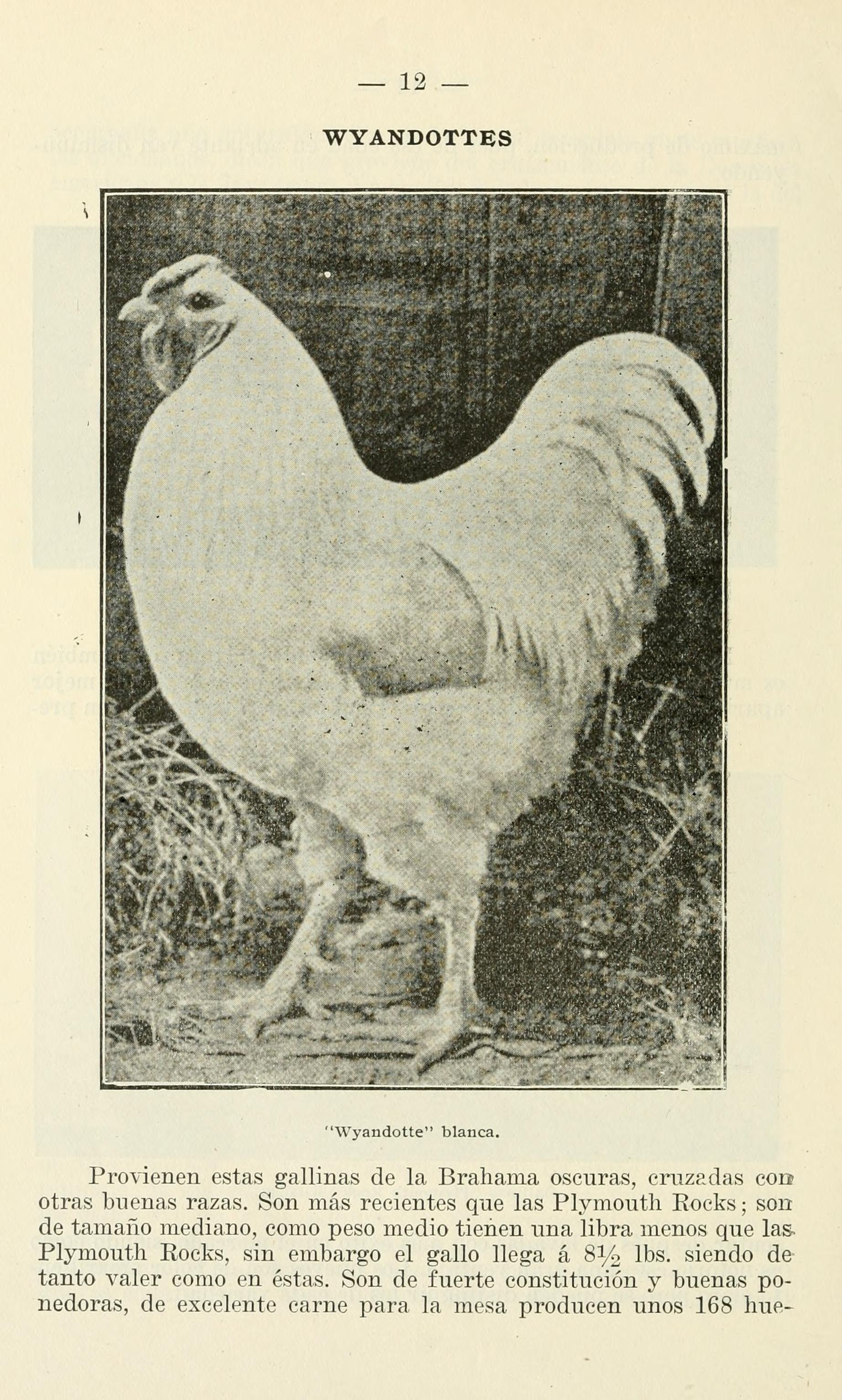 Circular / República de Cuba, Secretaría de Agricultura, Comercio y Trabajo, Estación Experimental Agronómica ...